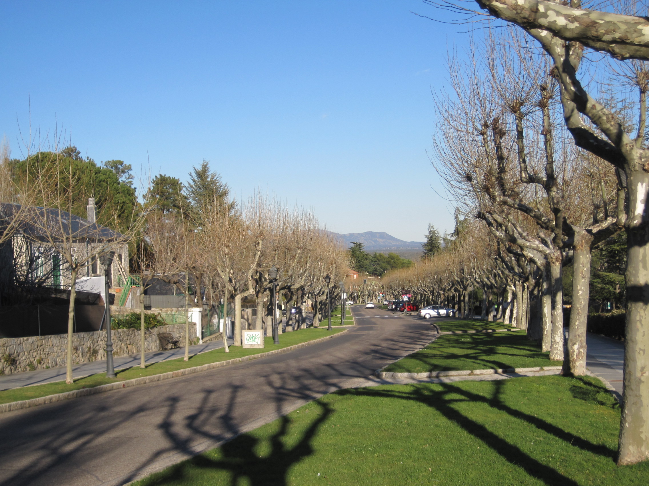 Avenida de la Constitución, en El Escorial (Madrid, España).